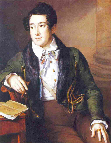 Тропинин Василий Андреевич. Портрет князя А.С.Долгорукова (1808-1873)